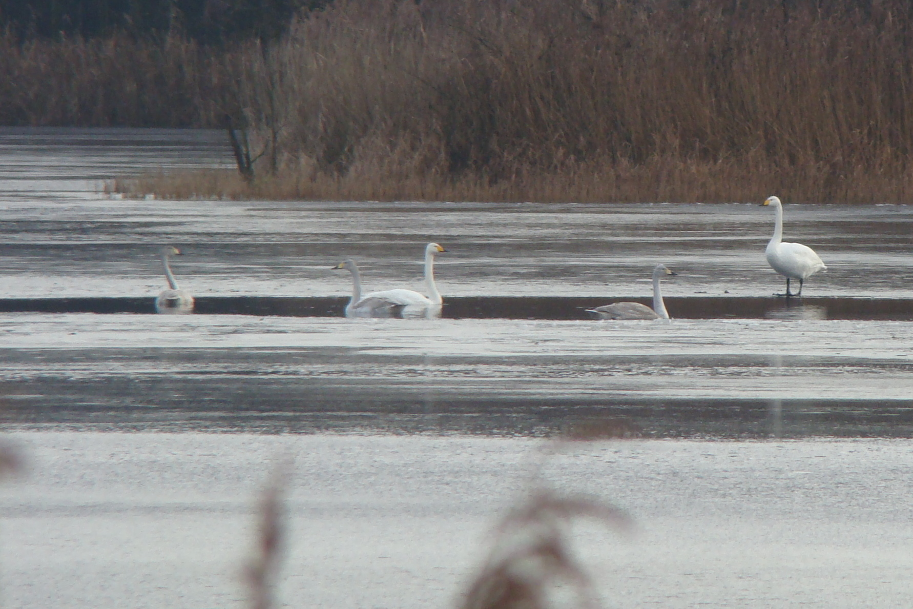 Singschwäne, Wintergäste a. d. Tundra Whooper Swans, winter visitors to Meißendorf Lakes from the tundra. Lower Saxony, Germany.